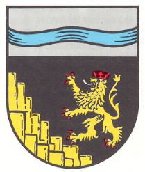 Wappen von Oberstaufenbach